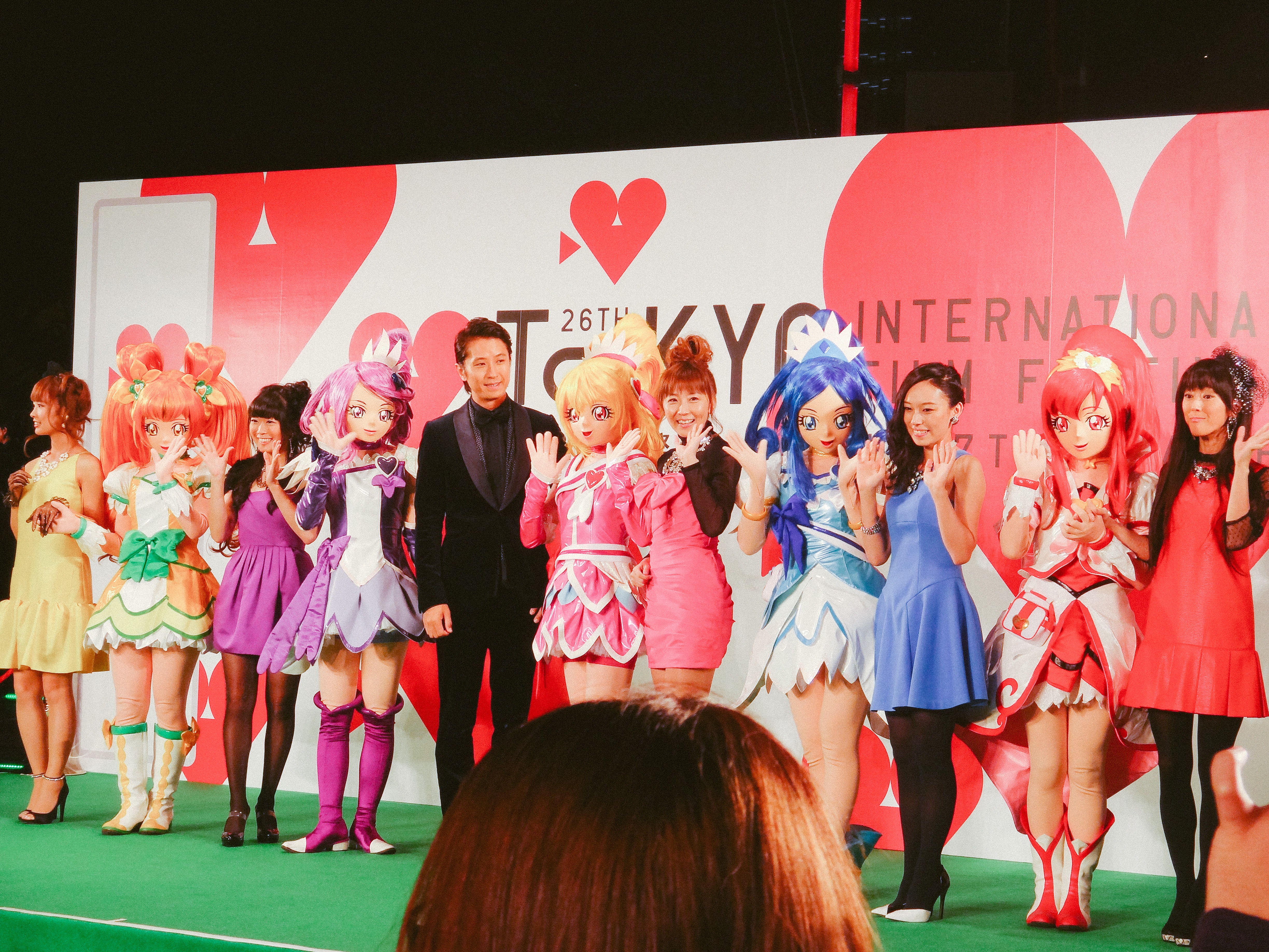 第26回 東京国際映画祭 谷原章介 釘宮理恵 宮本佳那子 渕上舞 寿美菜子 生天目仁美 (映画 ドキドキ!プリキュア マナ結婚!!?未来につなぐ希望のドレス)